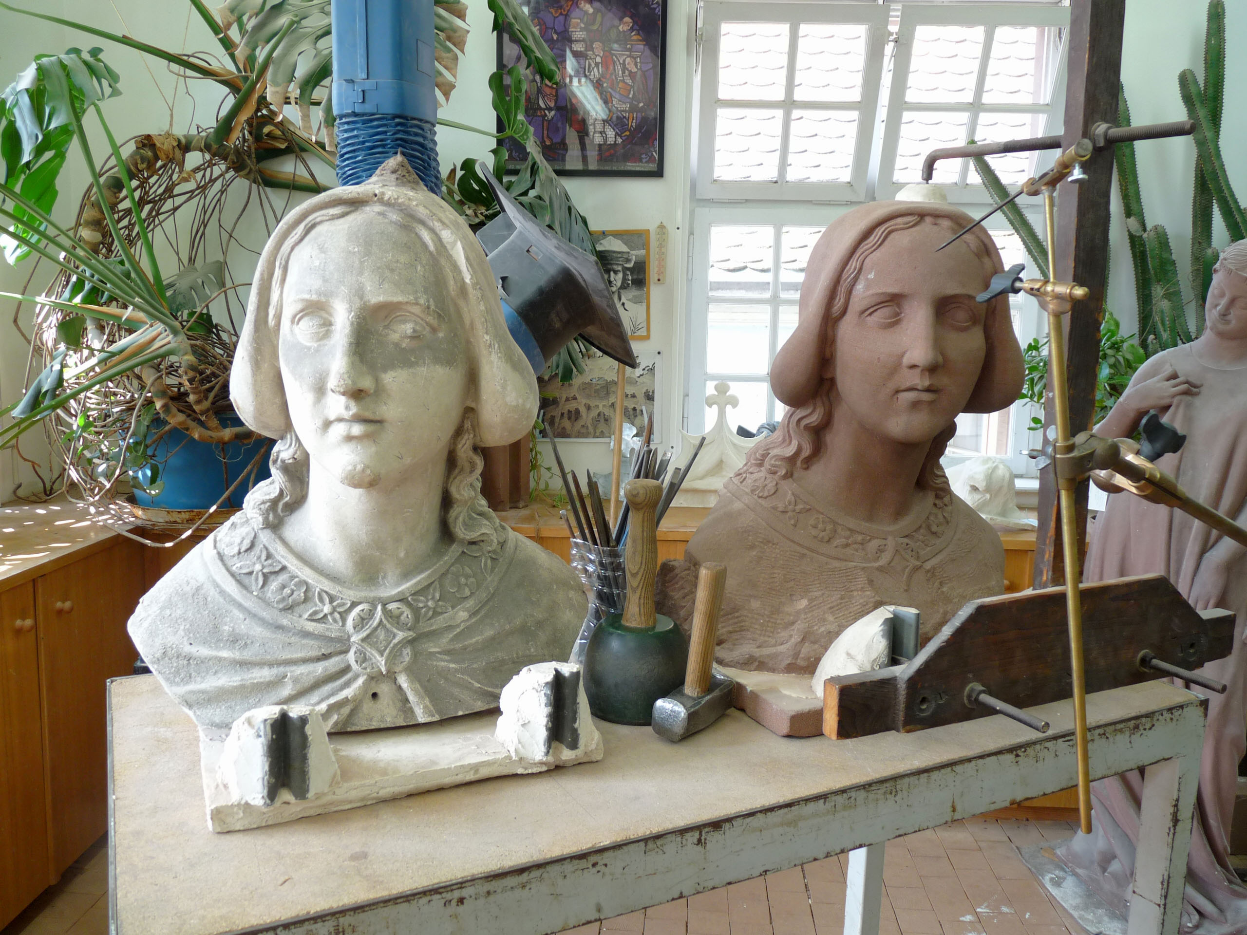 Atelier de sculpture de la Fondation de l'Oeuvre Notre-Dame : reconstitution d'une statue en grès rose de la cathédrale de Strasbourg à partir d'un moulage